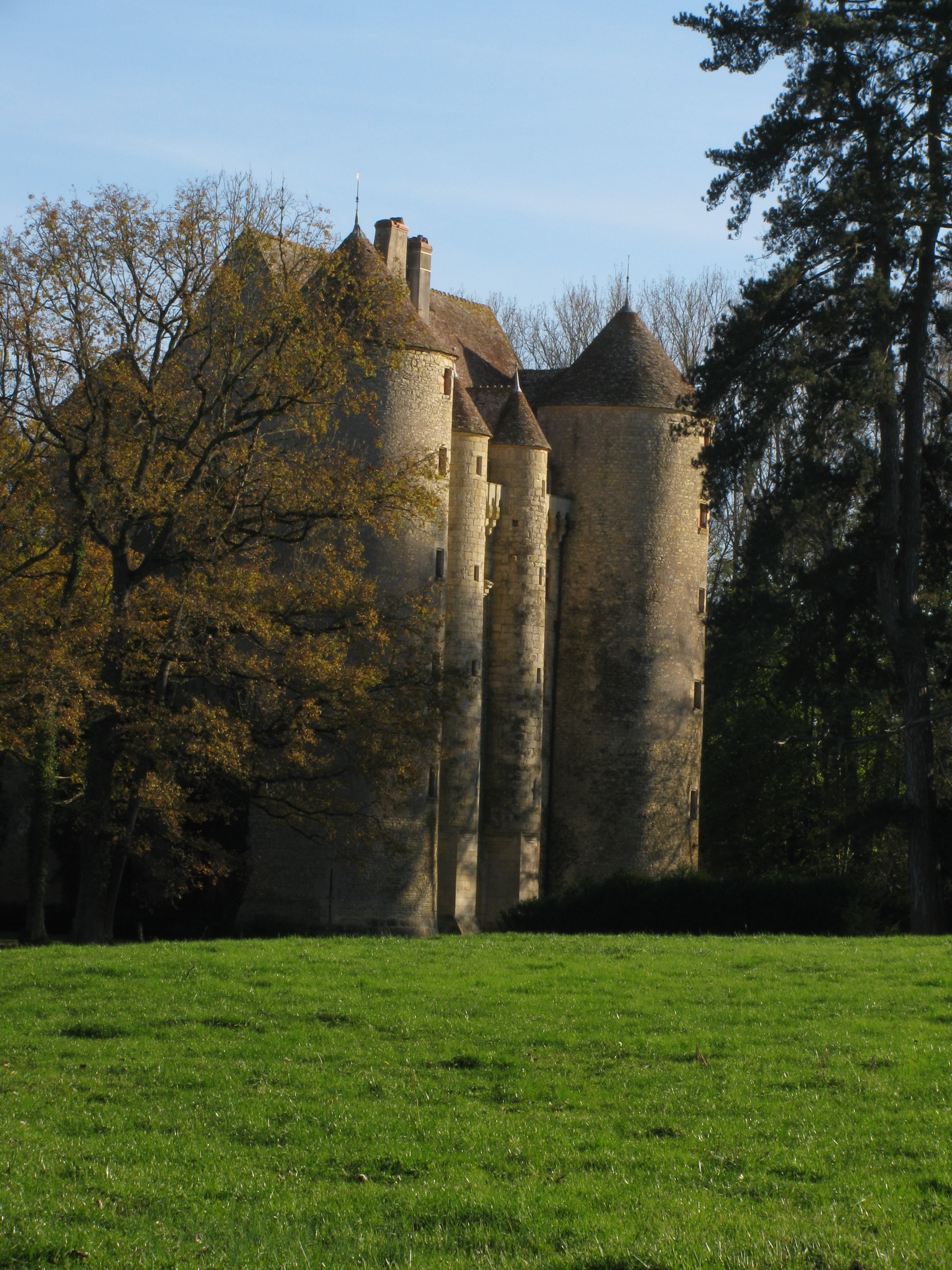 Le vieux château de Chevenon, à Chevenon, Nièvre, France.